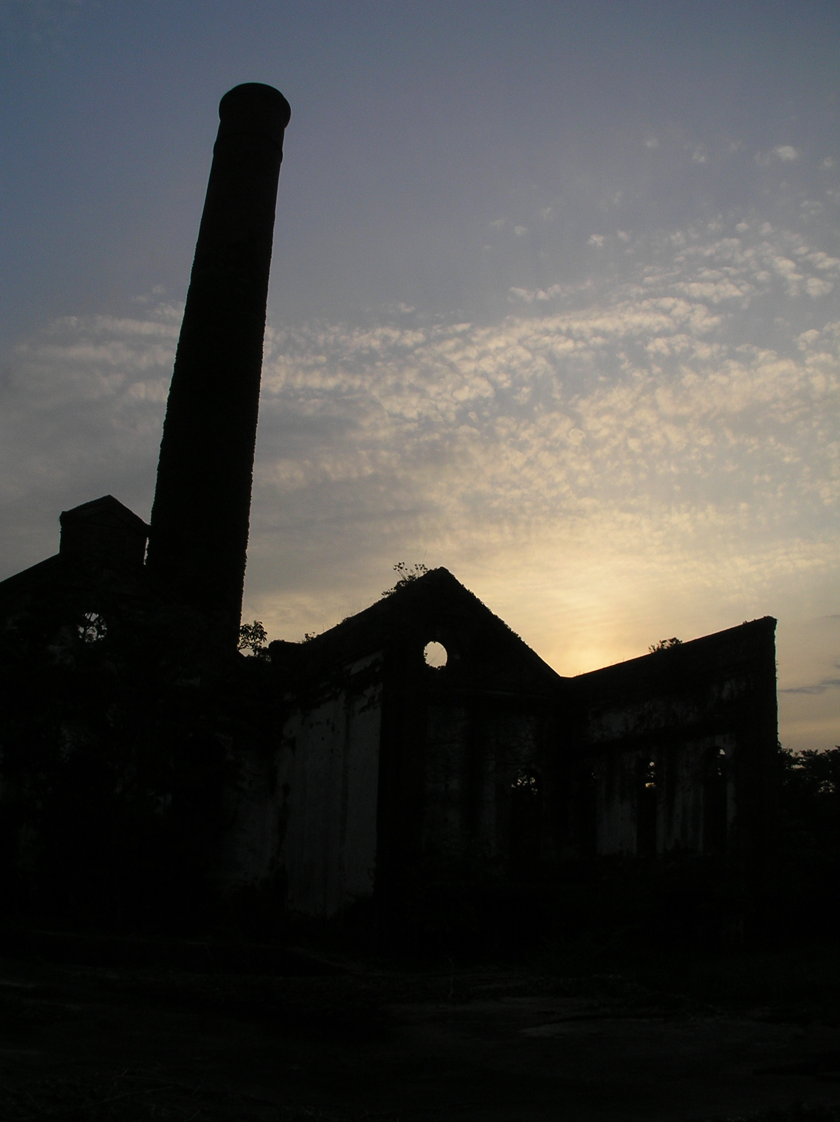 岡山県犬島発電所跡 【おぉたむすねィく 探検隊】Autumn Snake 建築部門顧問：サンドバッグ建築研究所長 （ＳＢ研） 公式ブログ：